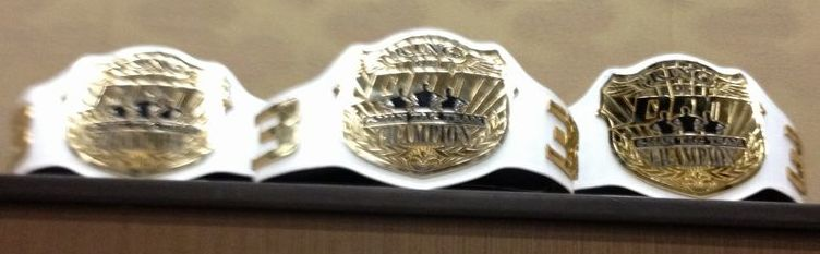 2013年1月